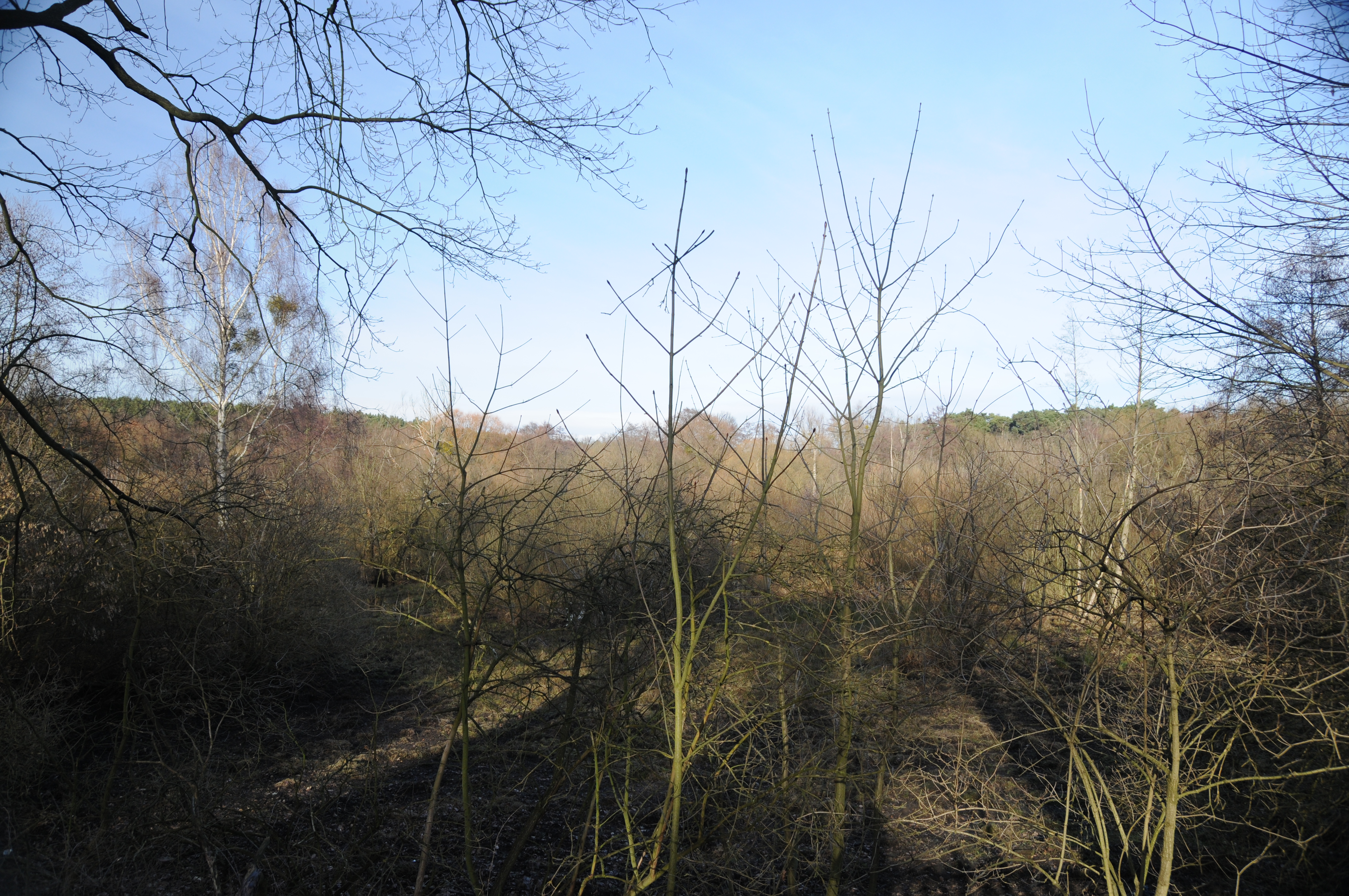 Naturschutzgebiet Bäkewiese vom angrenzenden Grundstück.